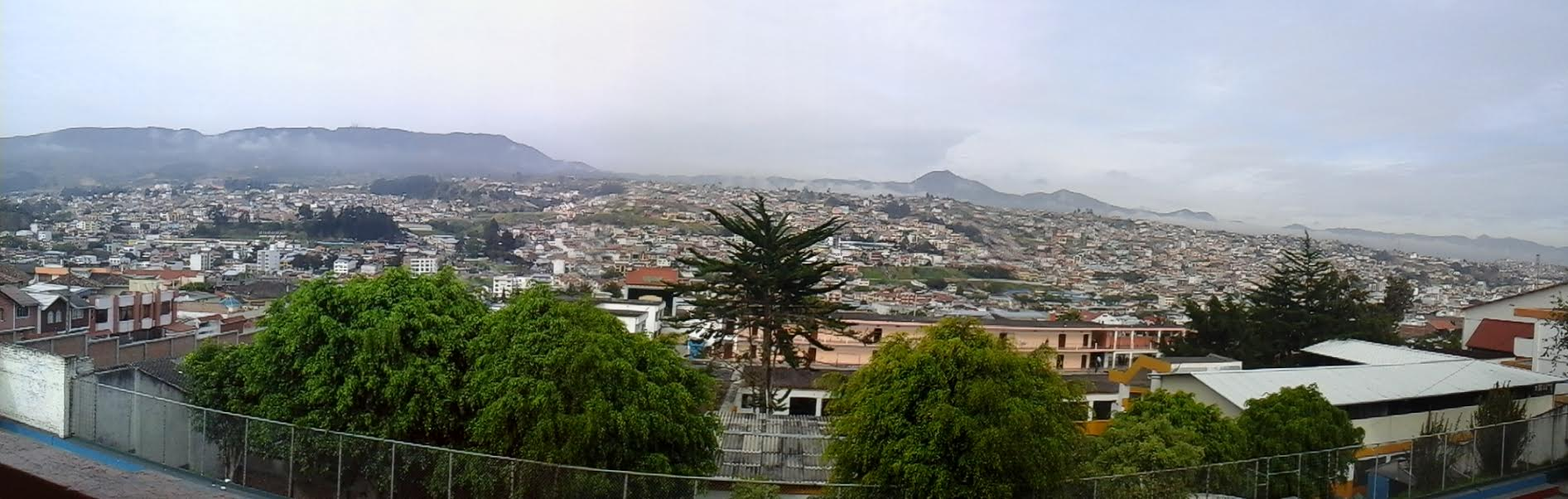 Foto panorámica de la ciudad de Loja, Ecuador.